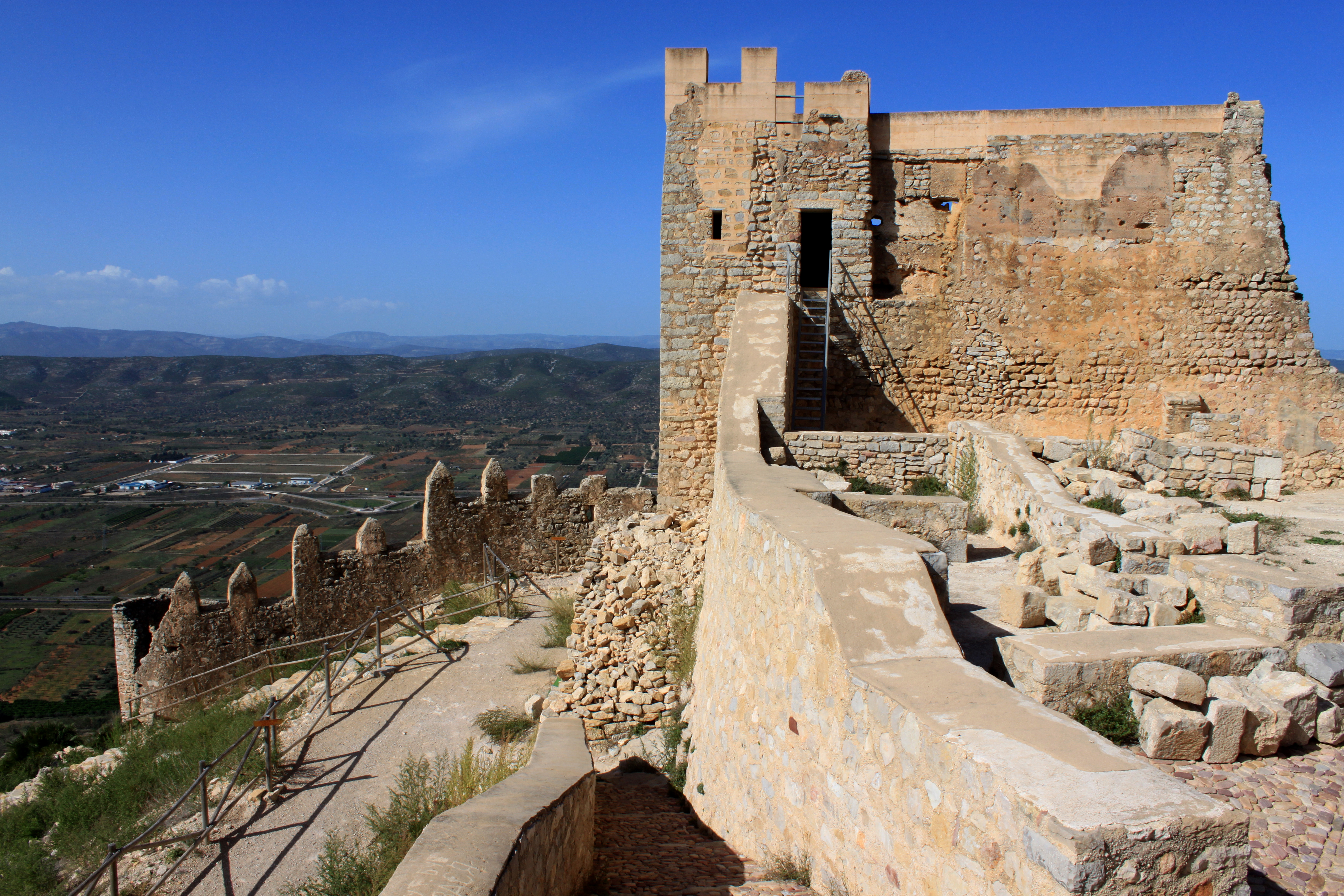 Castillo de Xivert. Vista desde la muralla de la alcazaba de la torre de Poniente y la muralla norte. Se aprecia el acceso superior de la torre a que se accedería desde el adarve de la muralla aunque ne la actualidad se ha añadido una escalera. A los pies de la muralla aparecen los restos de varias habitaciones correspondientes al alcázar. En el centro de la imagen aparece la rampa del acceso en acodo de la alcazaba desde el albacar. Al fondo se observa la muralla norte del albacar que discurría junto al castillo formando un camino de ronda. Alcalá de Xivert, provincia de Castellón, Comunidad Valenciana, España.